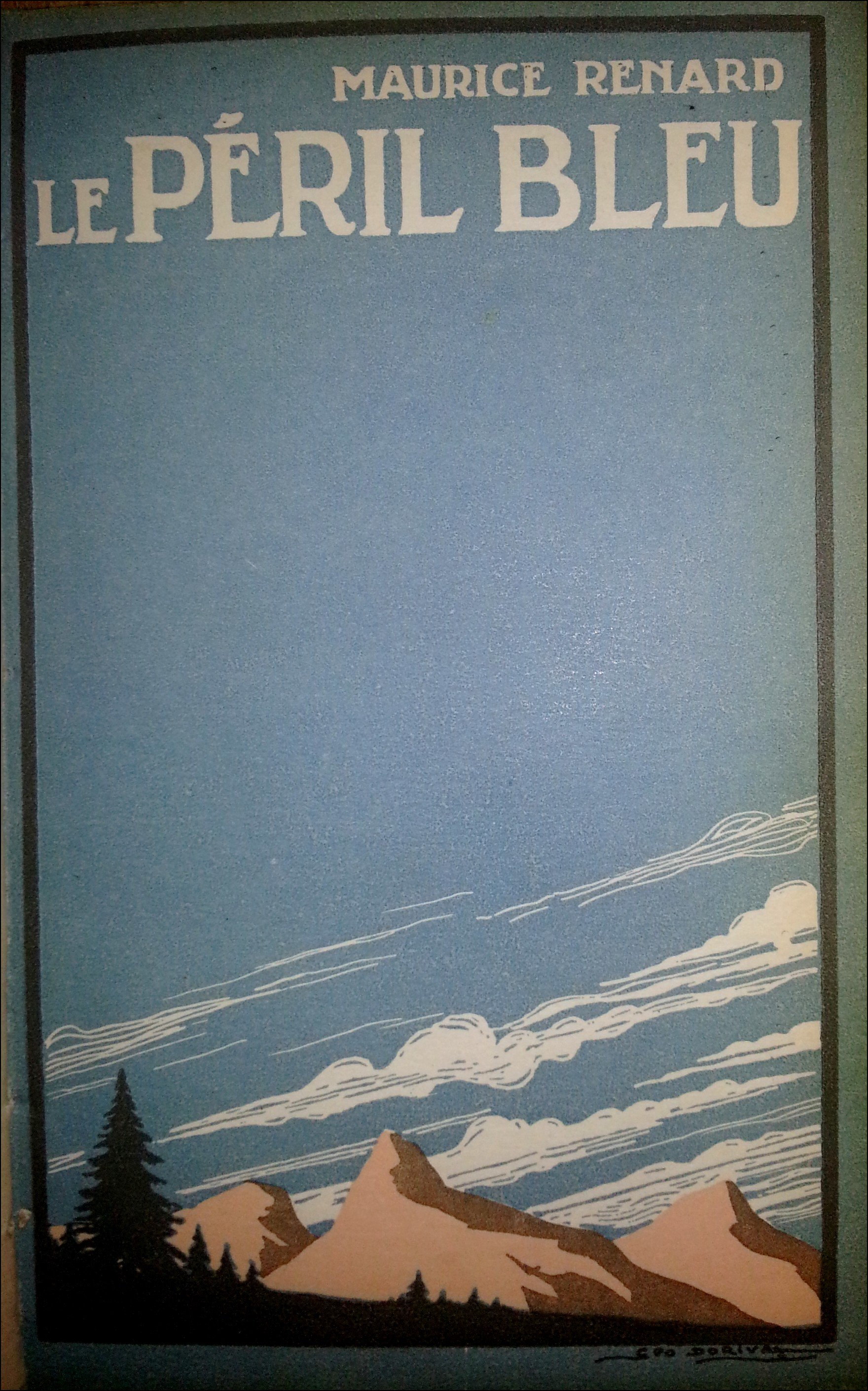 Page de couverture de l'édition originale du Péril bleu de Maurice Renard (1911)